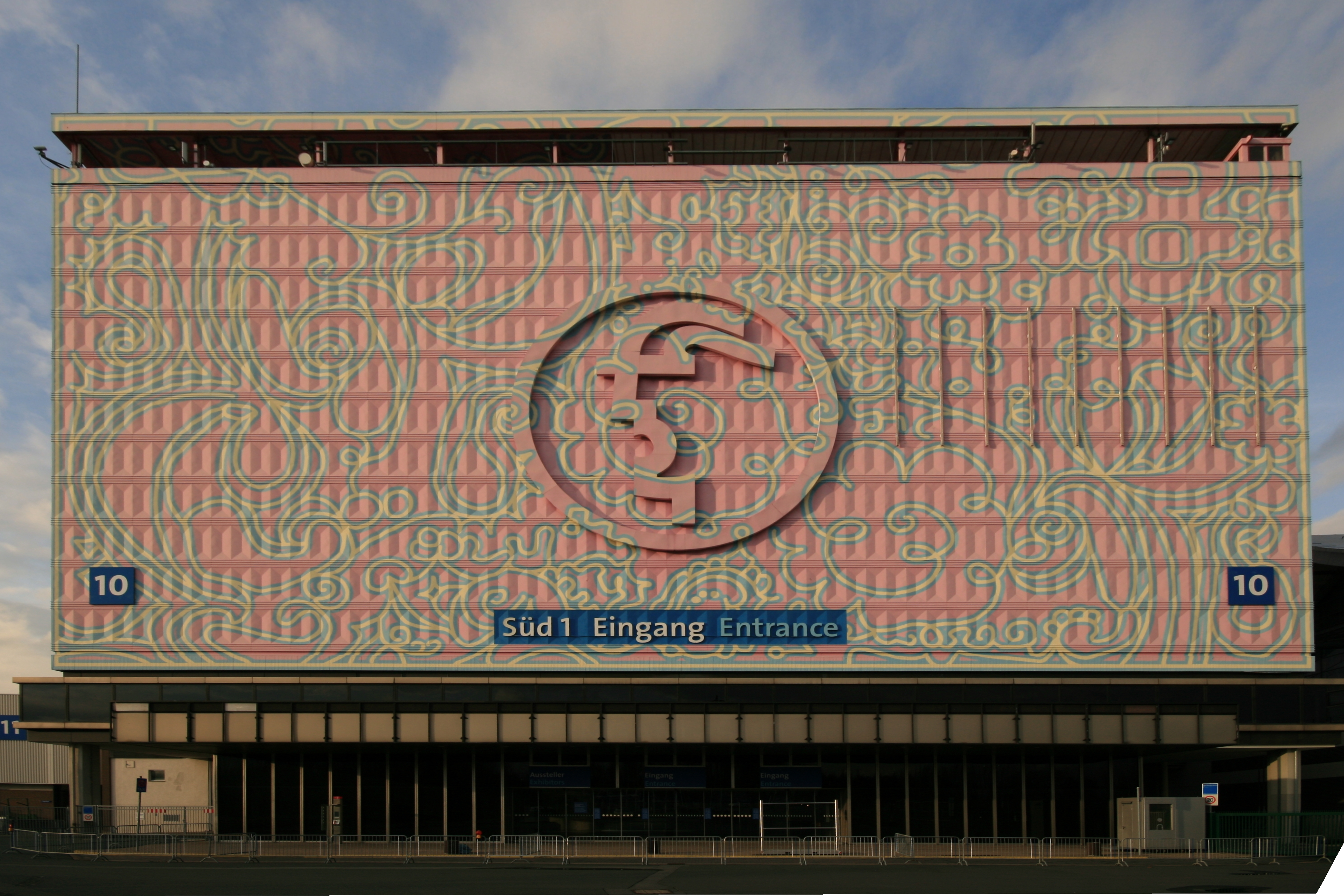 Eingang Sued 1 zum Messegelände Hannover